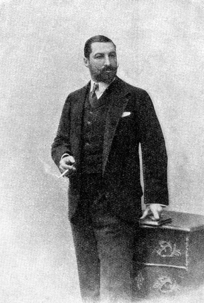 Rнязь Лев Михайлович Кочубей (1862—1927)